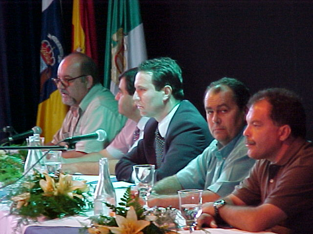 Acto de presentación del Proyecto Life para la recuperación del Saladar de Jandía, Fuerteventura